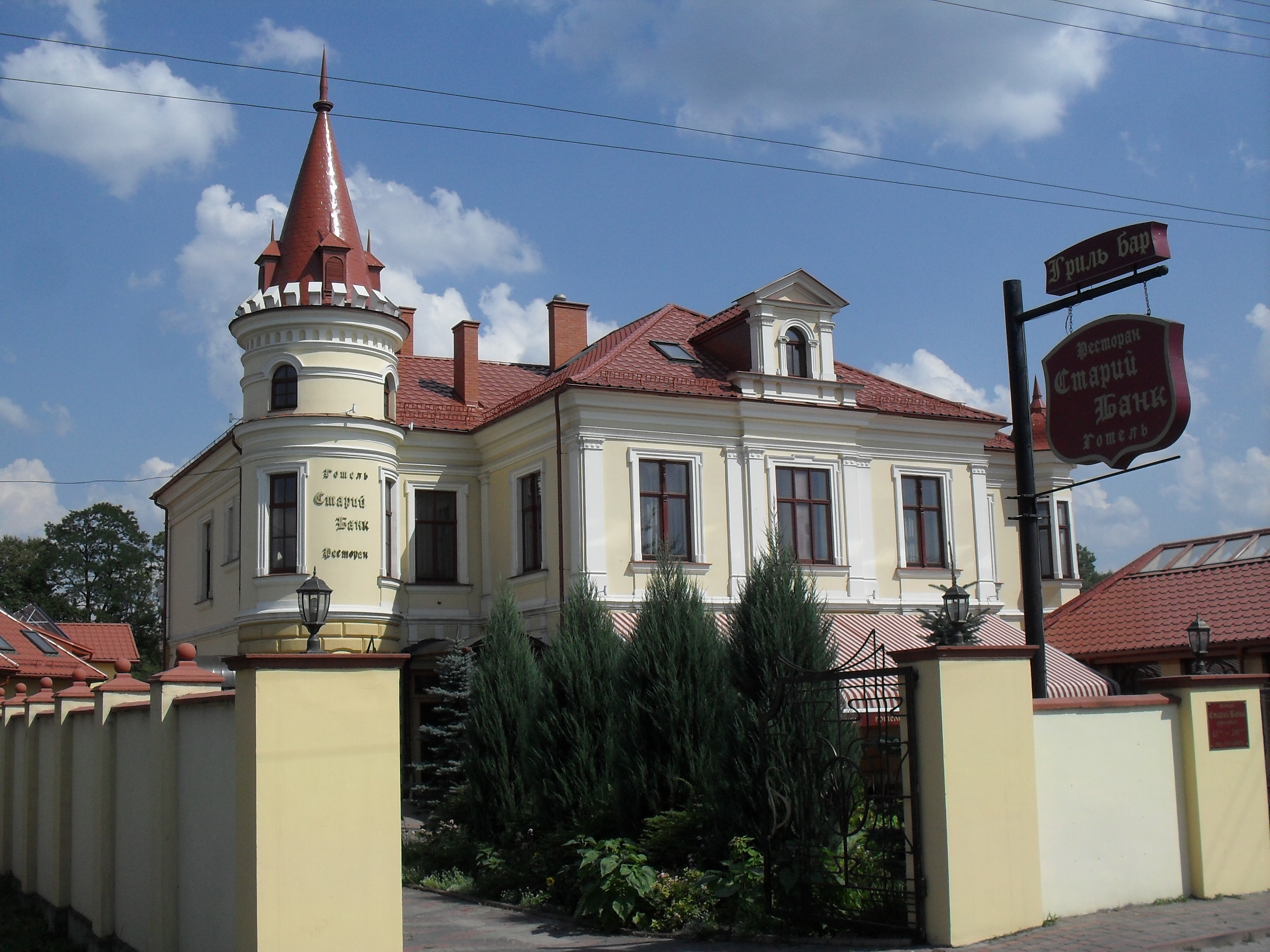 Садиба, вул. Грушевського, 33